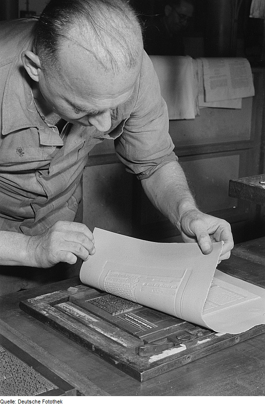 Original image description from the Deutsche Fotothek Herstellen einer Mater (Stereotypie)